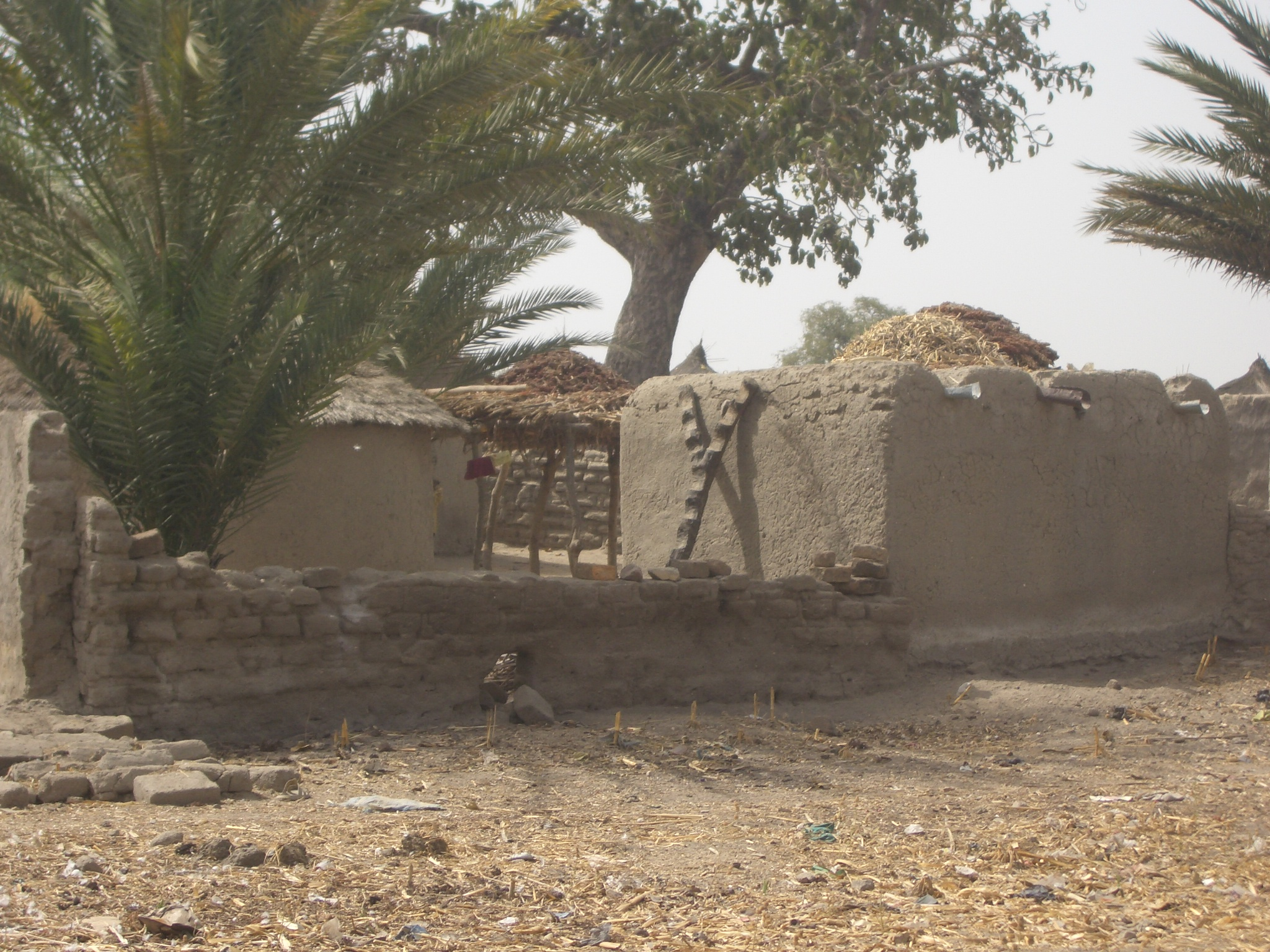 Tréné(Tschad), Haueser mit flachen Daechern